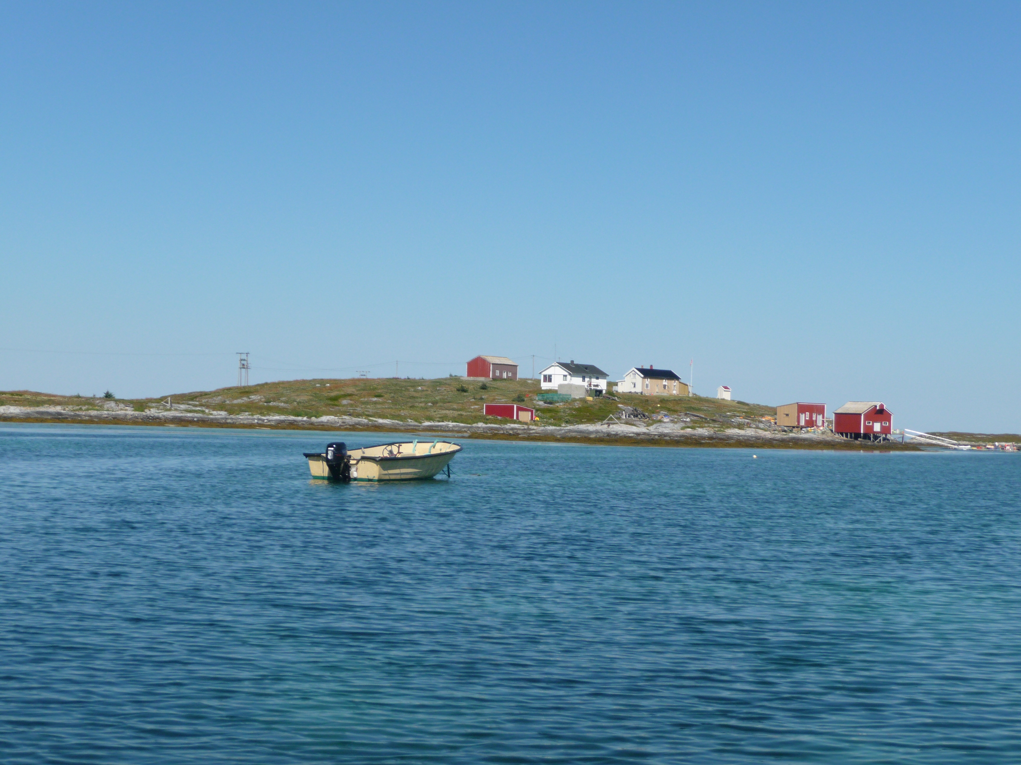 Innerodden